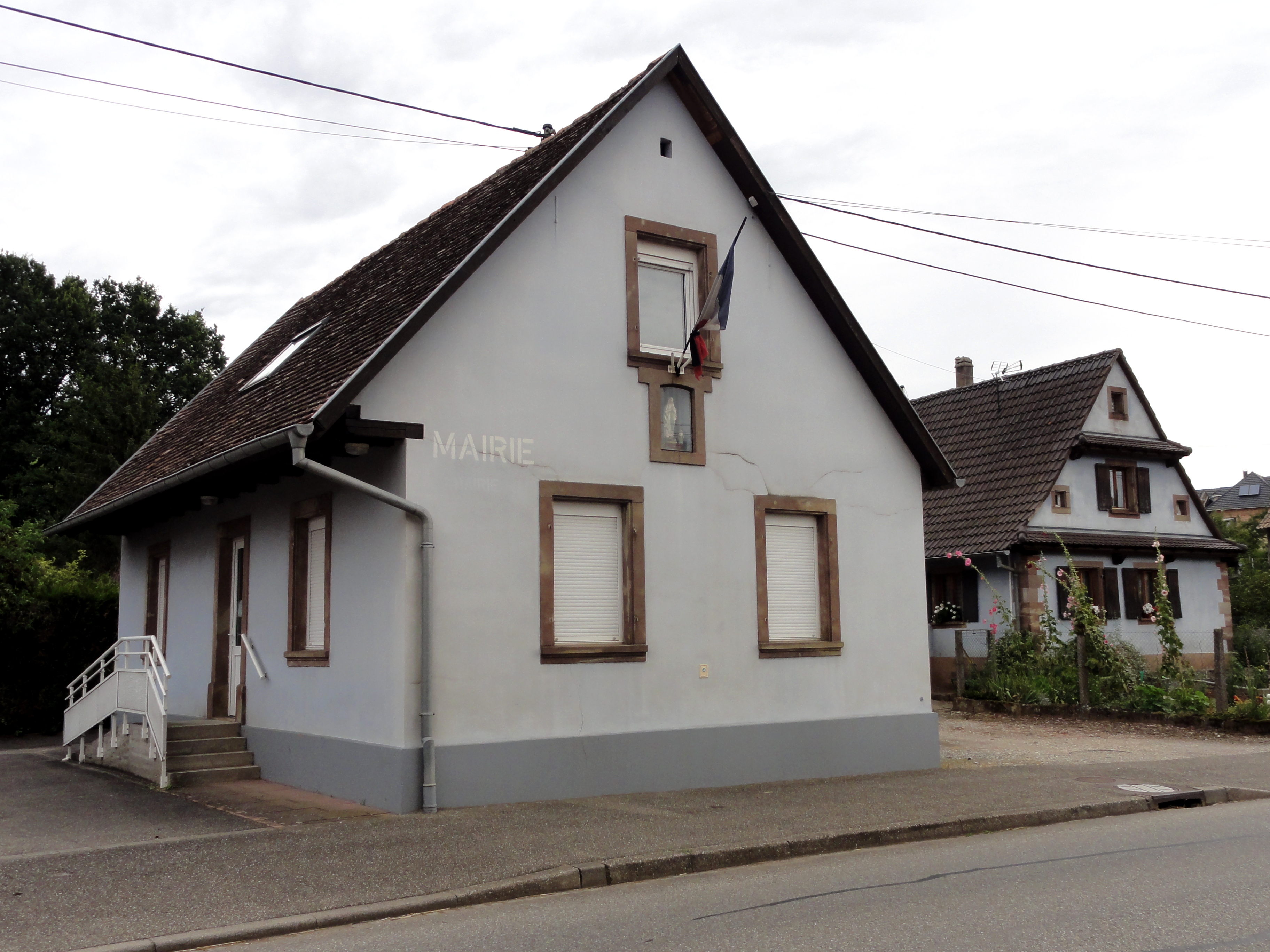 Alsace, Bas-Rhin, Lixhausen, Mairie.